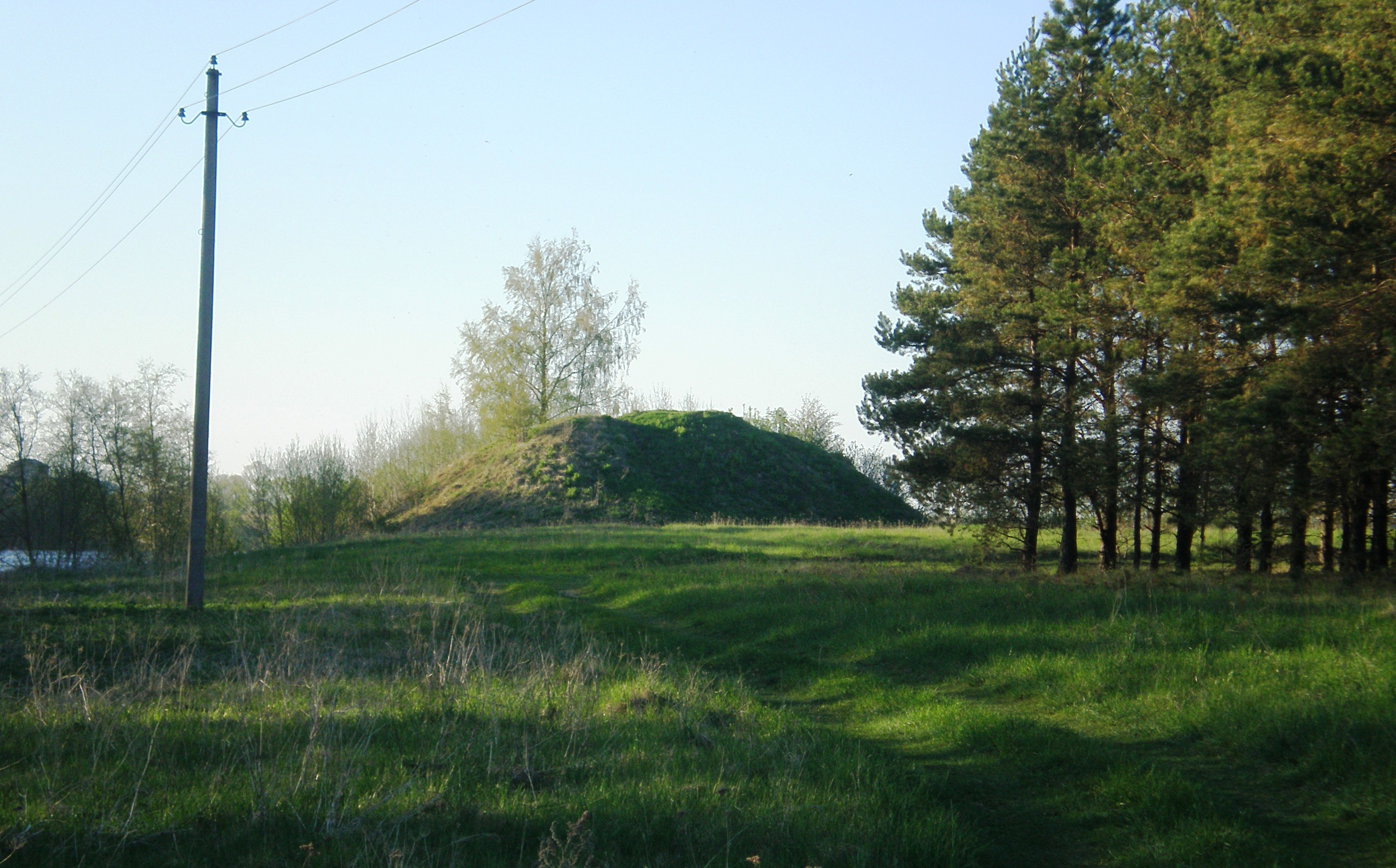 Vaitiekūnų piliakalnis, Radviliškio raj.